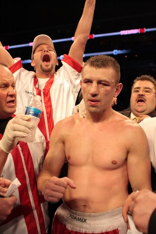 Tomasz Adamek - polski bokser, mistrz świata